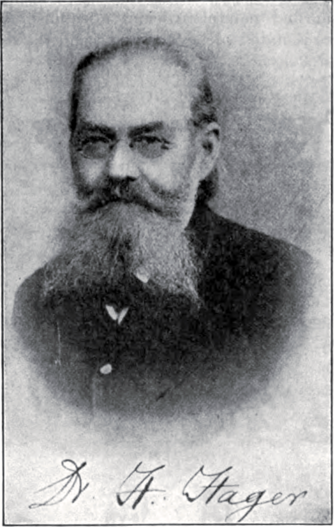 Hermann Hager (1816-1897), Autor pharmazeutischer und botanischer Schriften, in Neuruppin, Brandenburg, Deutschland